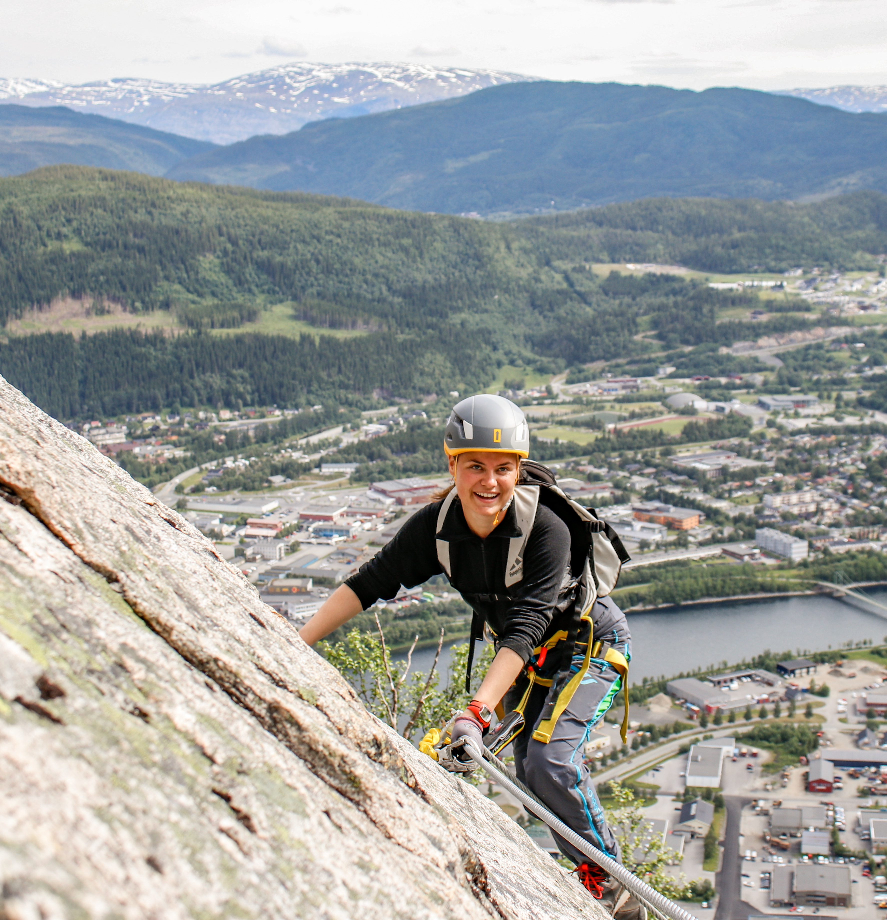 Mosjøen via ferrata Helgeland. Foto: Cato Ravassbakk